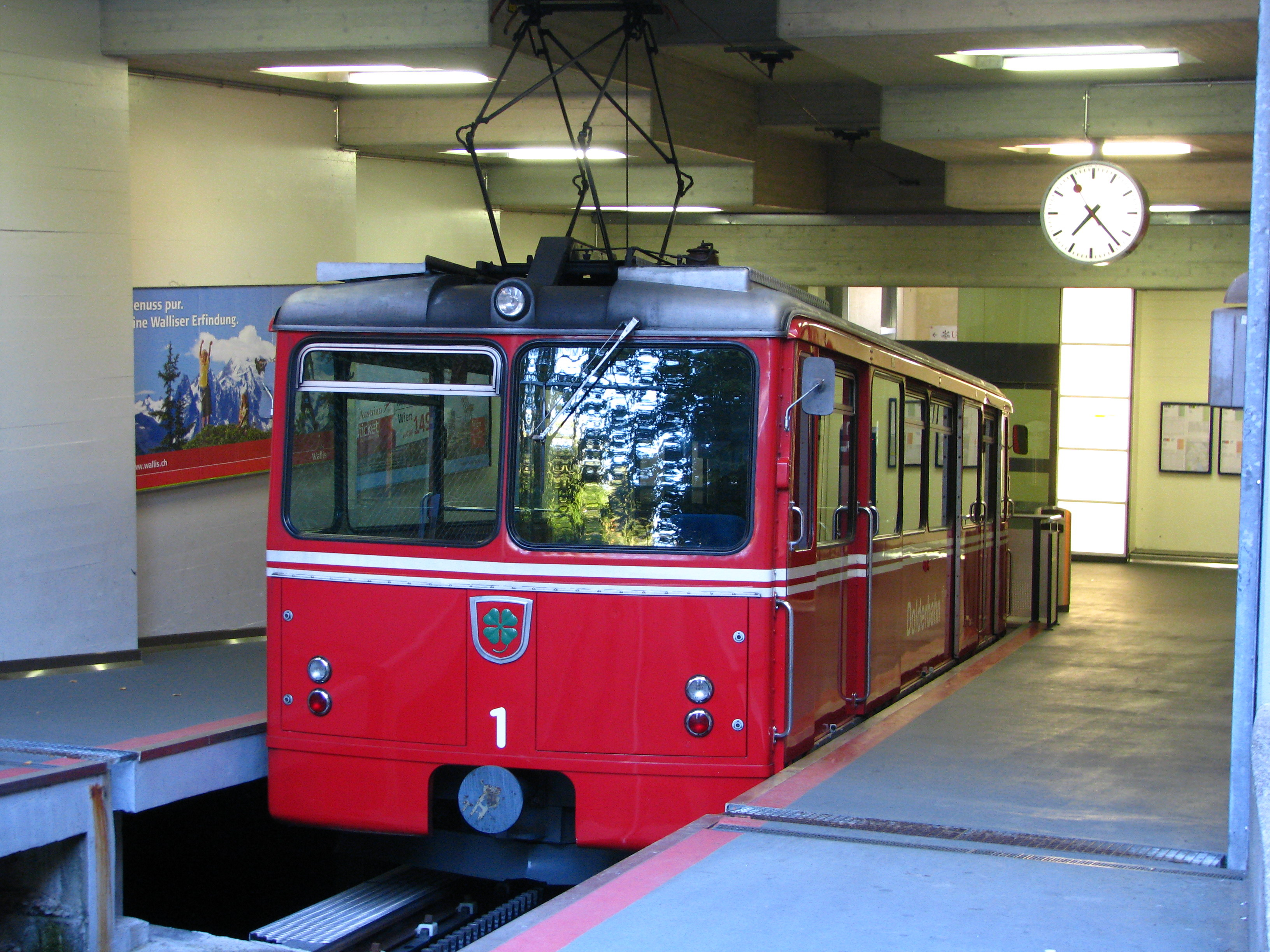 Dolderbahn railcar No. 1 at Zürich-Römerhof